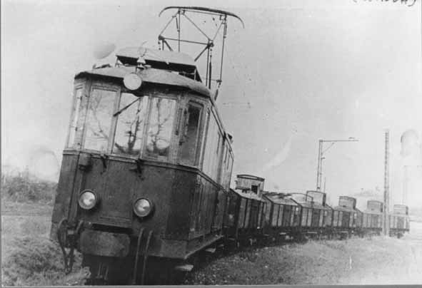 Treno merci sull'anello di inversione a Zagarolo Scalo, sulla ferrovia Roma-Fiuggi-Alatri-Frosinone.